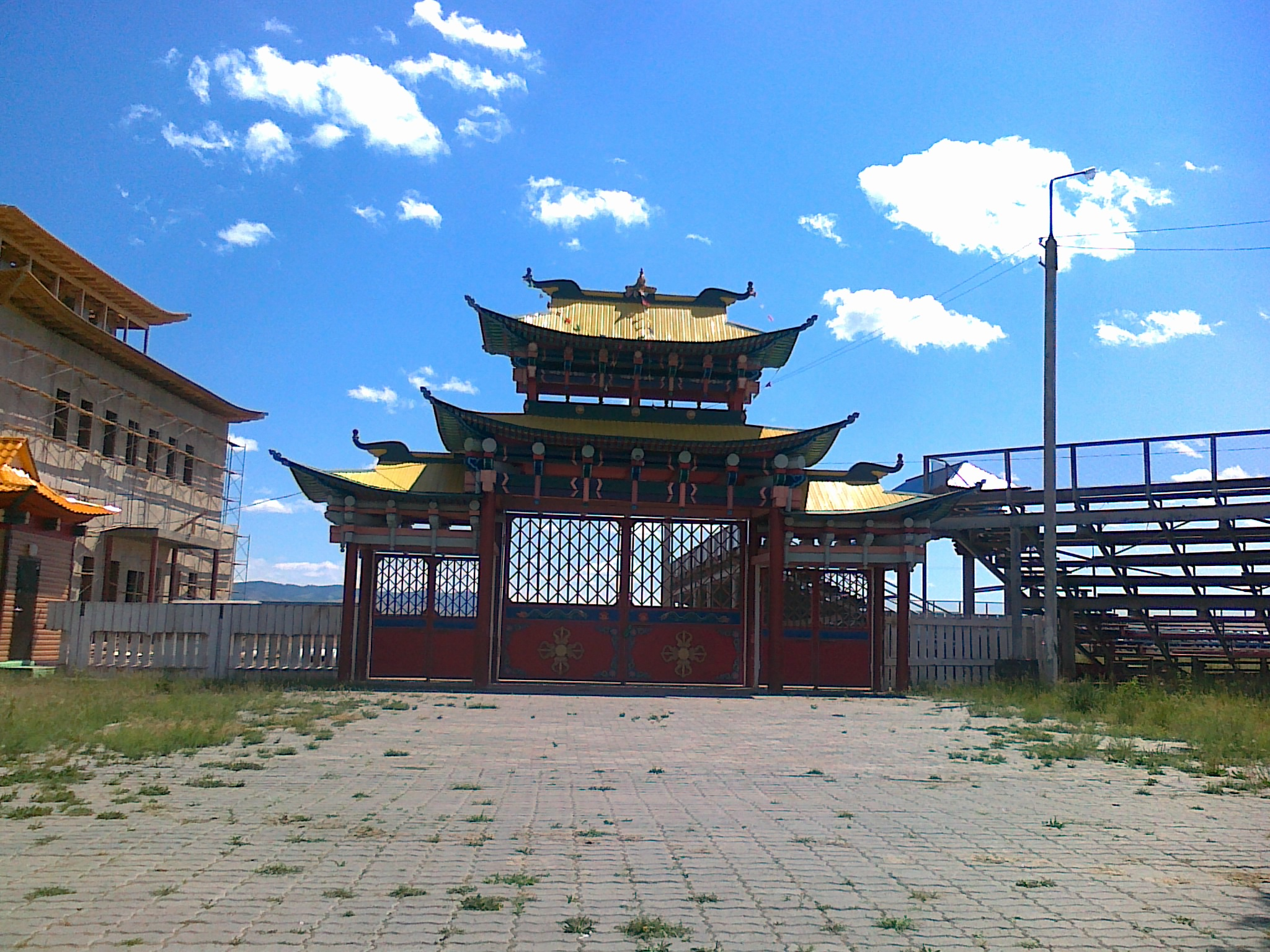 The main gate of the Ivolginsky datsan. Inside view